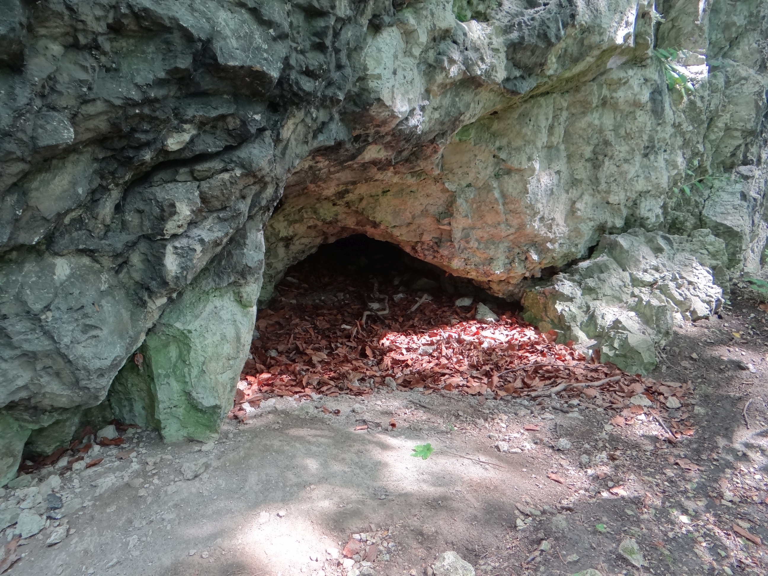 Jaskinia w Ostryszni w skale Cieplarnia w Wąwozie Ostryszni